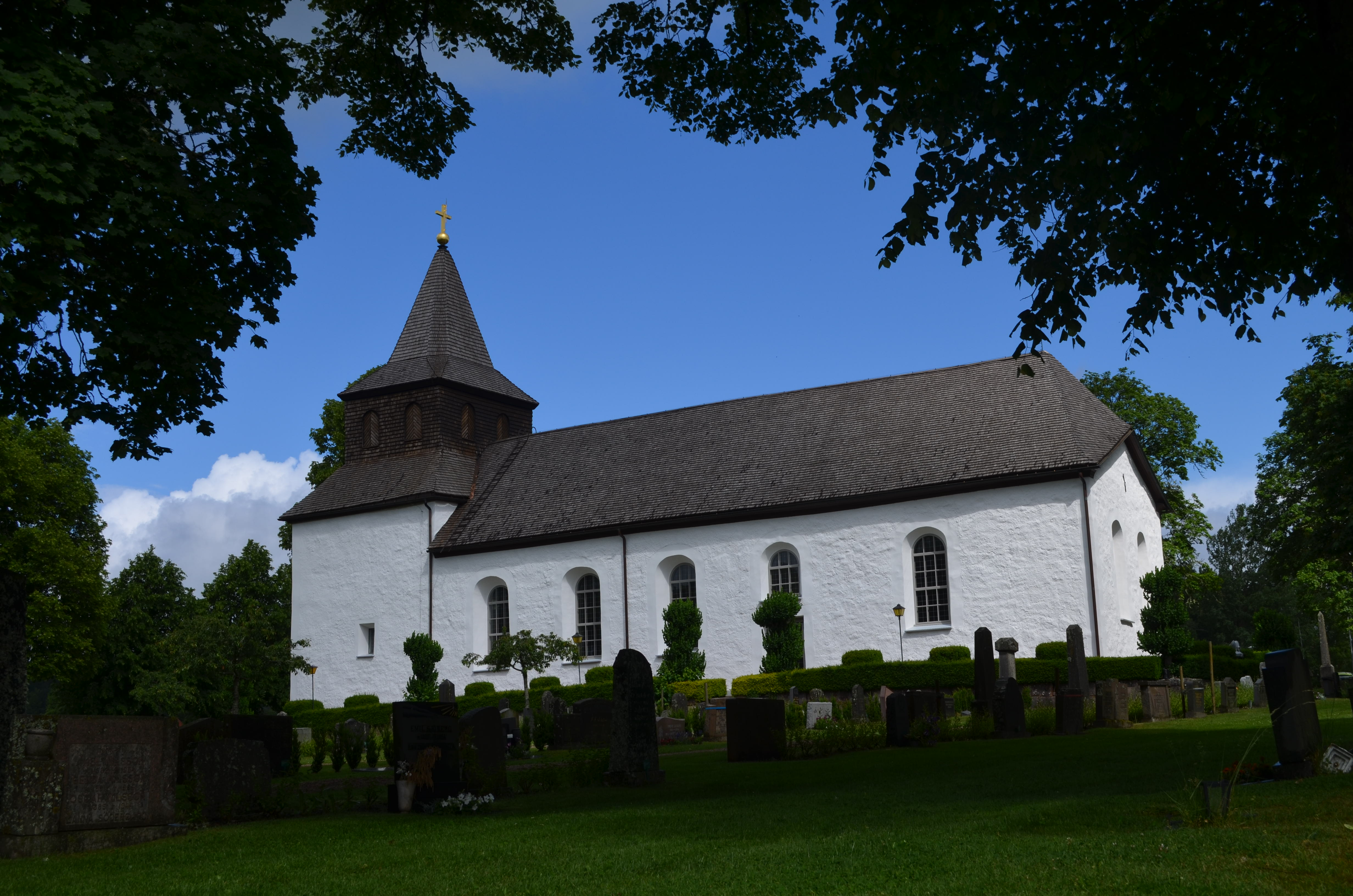 Kulltorps kyrka